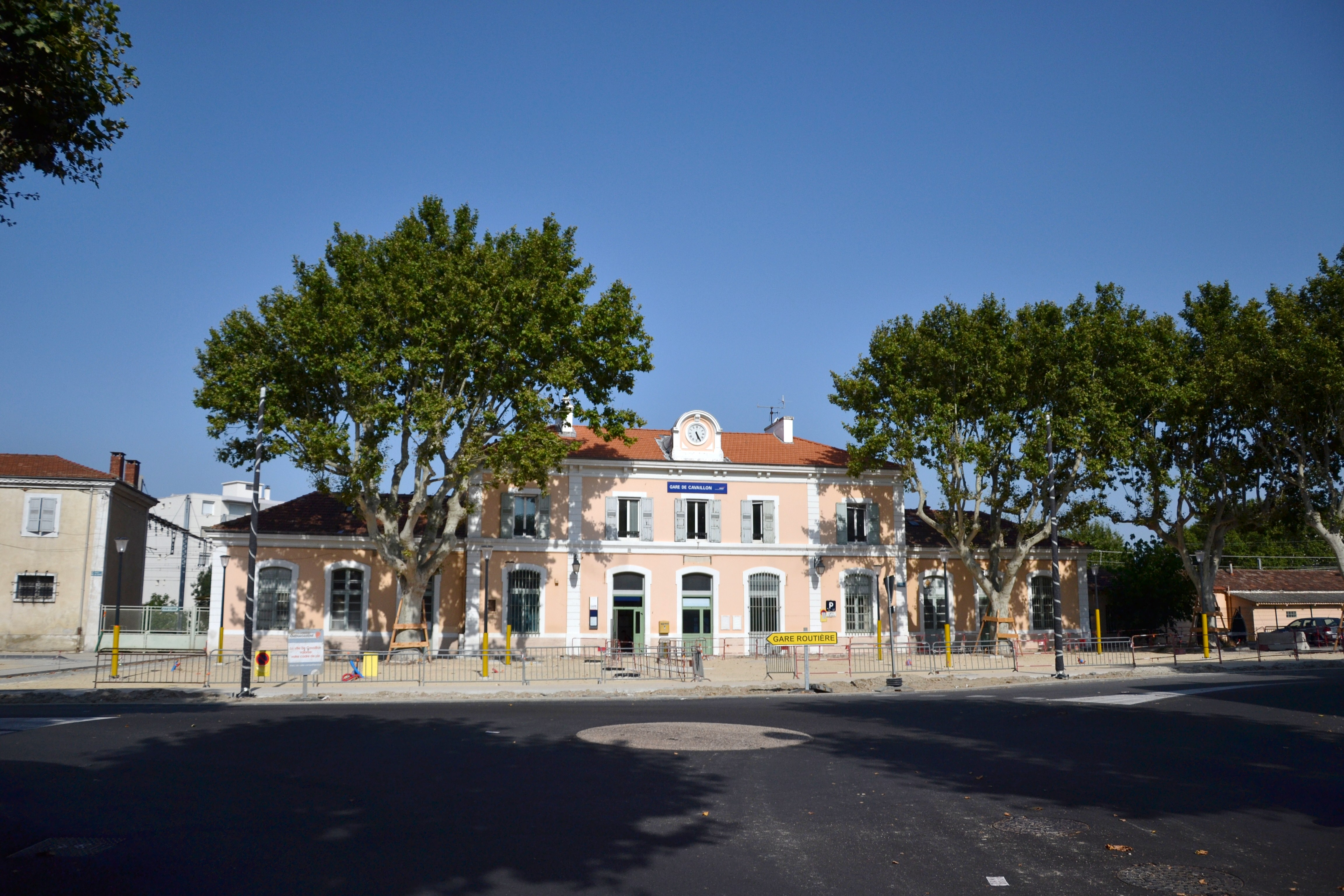 Façade de la gare de Cavaillon